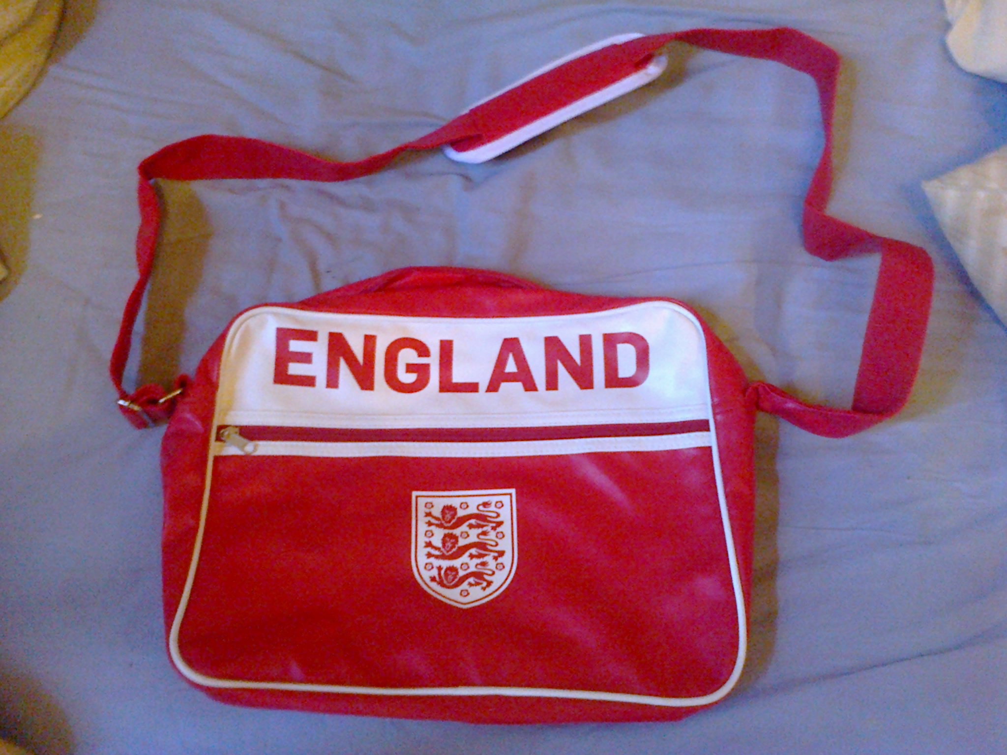 Besace de l'équipe d'Angleterre de football (2014)